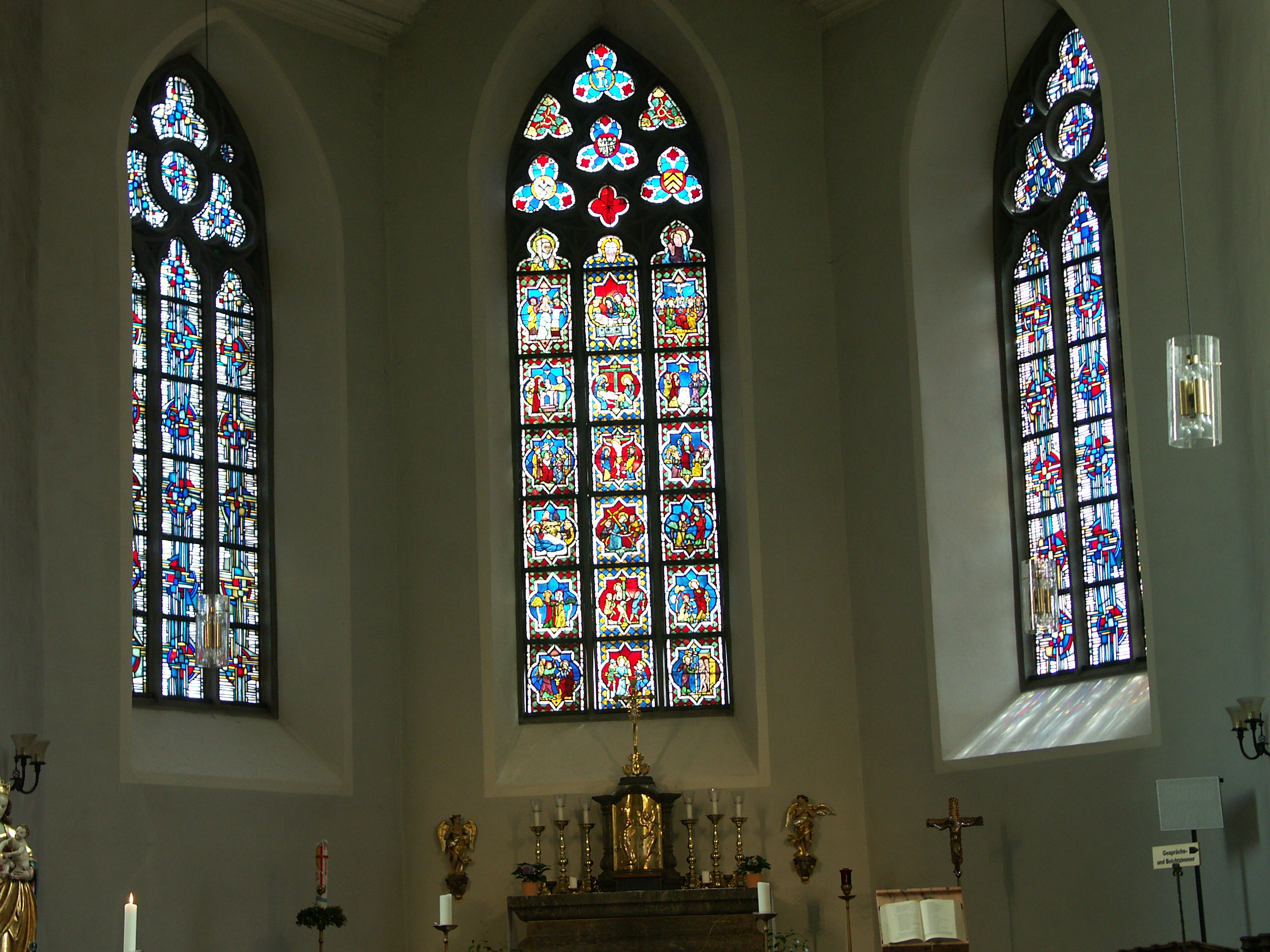 Chorfenster in der St. Anna-Kirche Limburg/Lahn, Germany